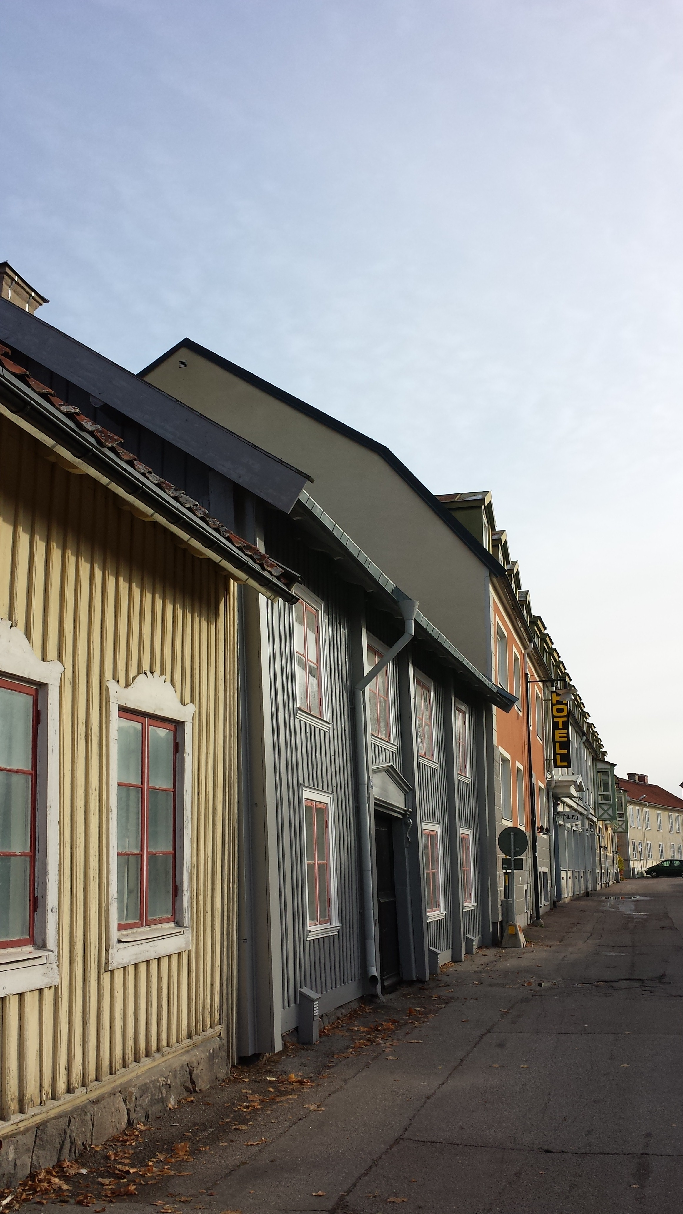 Nyströmska gården (Hermod 1 och 2)